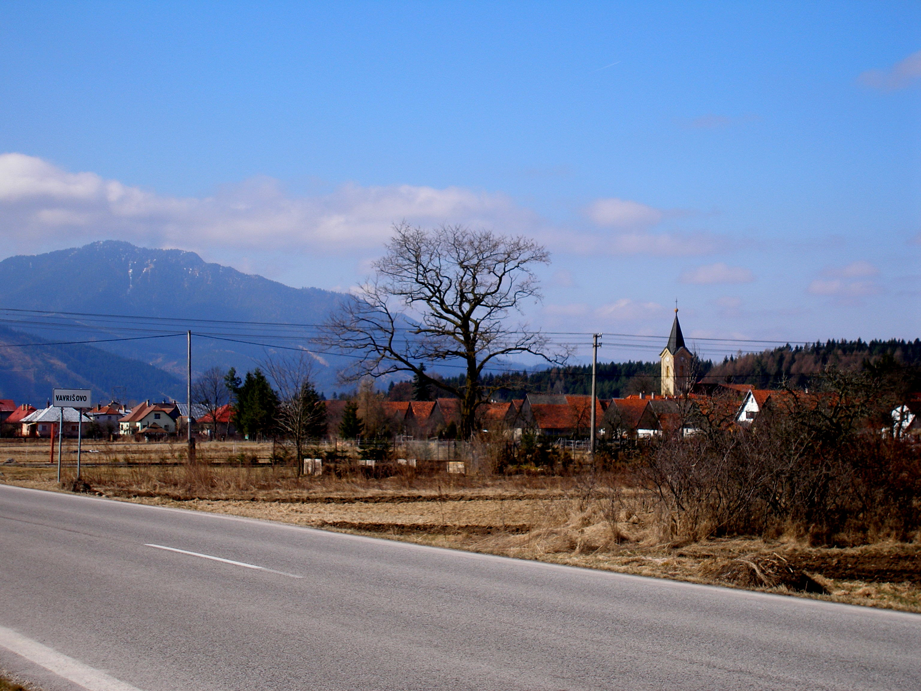 Pohľad na časť podtatranskej obce Vavrišovo.